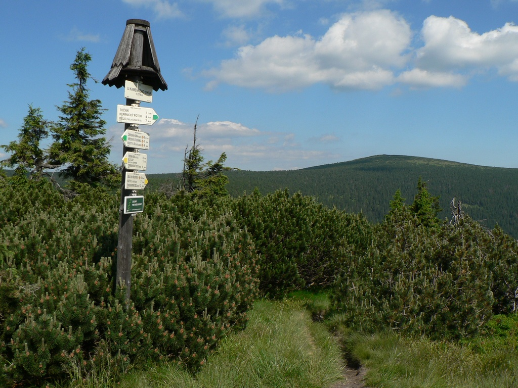 Pohled na Keprník od Kamenného okna.